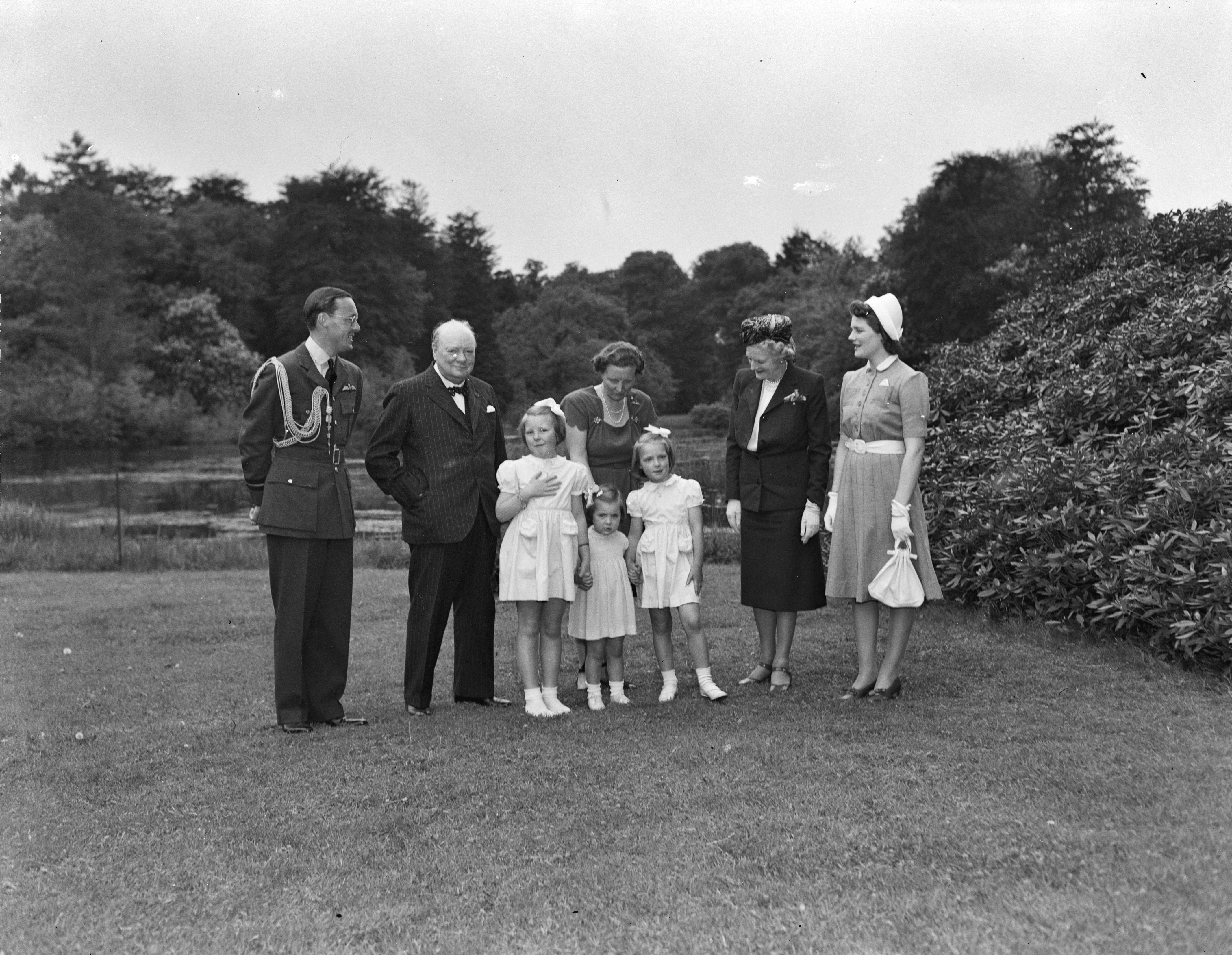 Collectie / Archief : Fotocollectie Anefo Reportage / Serie : [ onbekend ] Beschrijving : Winston Churchill op bezoek op paleis Soestdijk. Vlnr. prins Bernhard, Winston Churchill, prinses Beatrix, prinses Juliana, prinses Margriet, prinses Irene, Clementina Churchill en [Sarah Churchill?] Datum : 8 mei 1948 Locatie : Soestdijk, Utrecht Trefwoorden : bezoeken, koninklijk huis, prinsen, prinsessen, staatsmannen Persoonsnaam : Beatrix, prinses, Bernhard (prins Nederland), Churchill Clementine, Churchill Somes Mary, Churchill, Winston, Irene, prinses, Juliana, prinses, Margriet, prinses Fotograaf : Raucamp, Koos / Anefo Auteursrechthebbende : Nationaal Archief Materiaalsoort : Negatief (zwart/wit) Nummer archiefinventaris : bekijk toegang 2.24.01.04 Bestanddeelnummer : 901-7405